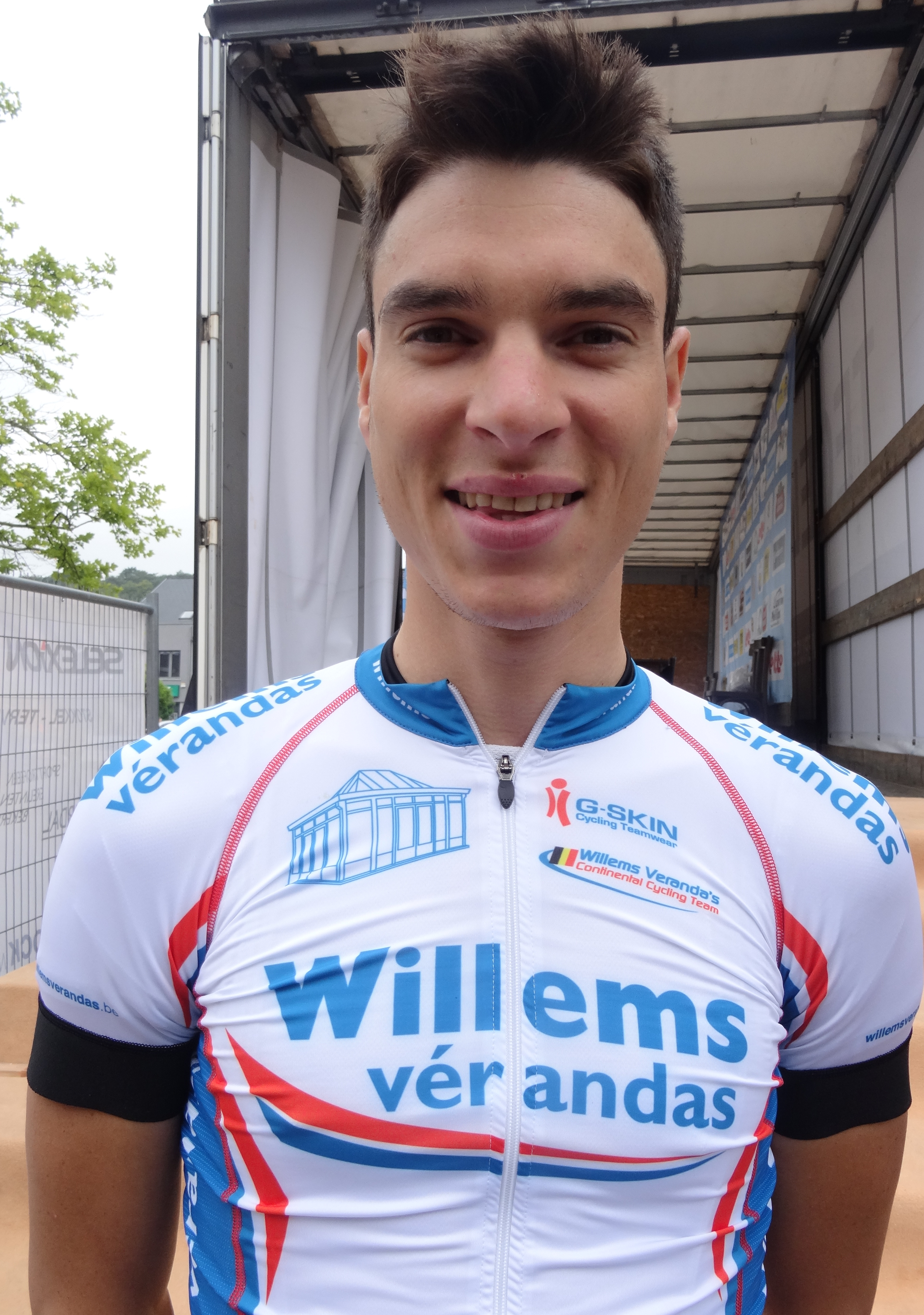 Reportage photographique réalisé le mercredi 27 août à l'occasion du départ de la Druivenkoers Overijse 2014 à Huldenberg, Belgique.